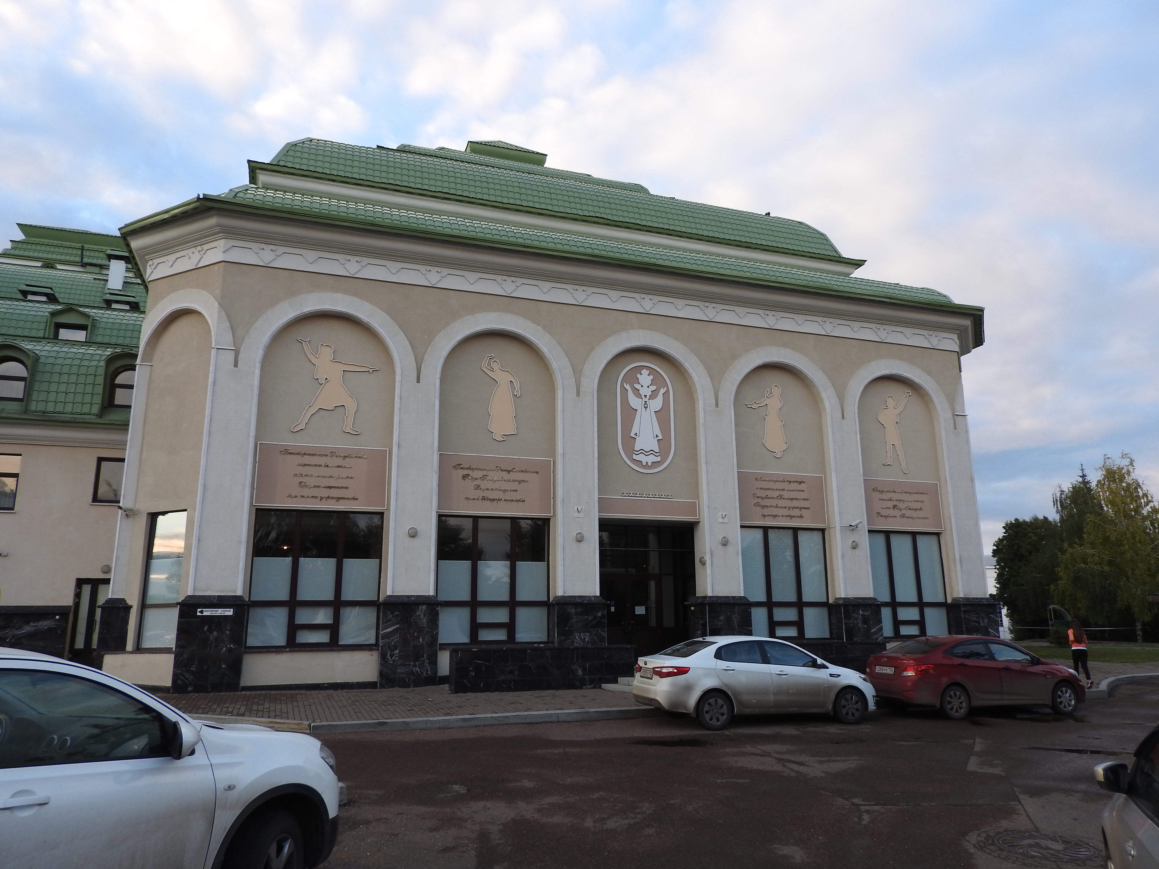 Фасад здания Государственного академического ансамблья народного танца им. Файзи Гаскарова